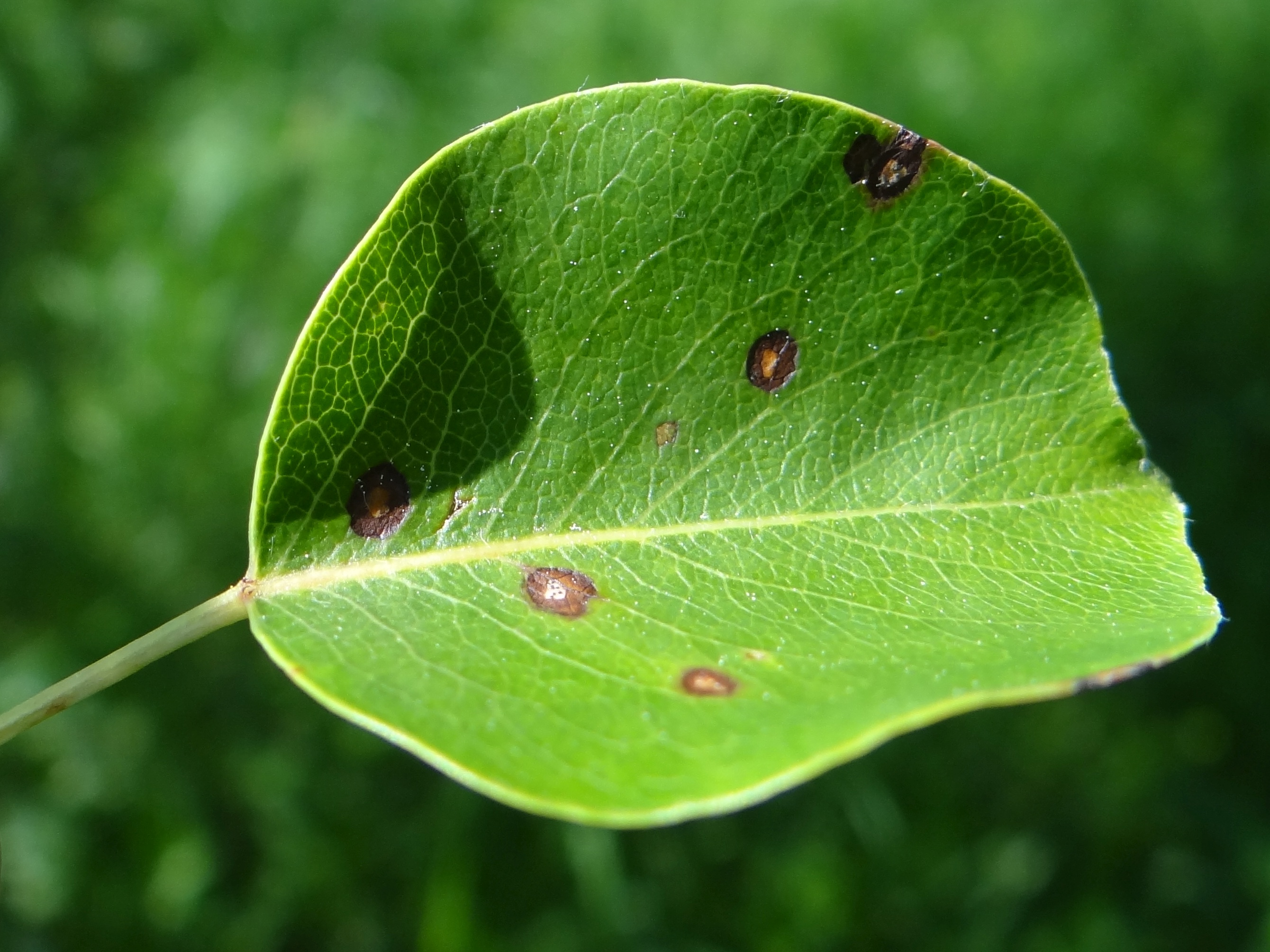 Mycosphaerella pyri on leaf Pyrus communis. Location: Poland, Trzciana, województwo małopolskie